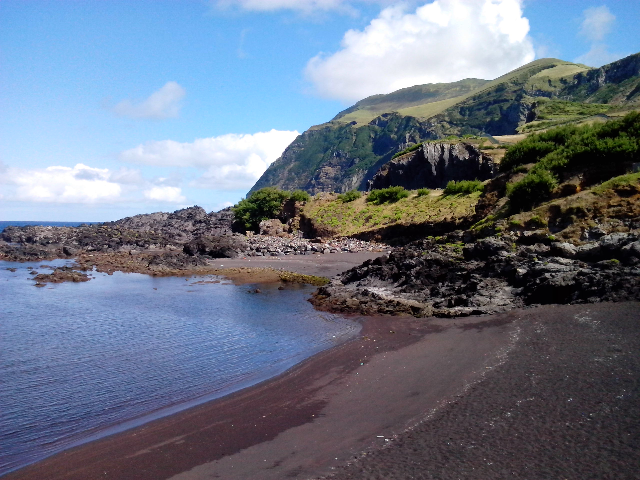 Ilha do Corvo Açores, Portinho da Areia, Arquivo de Villa Maria, ilha Terceira, Açores